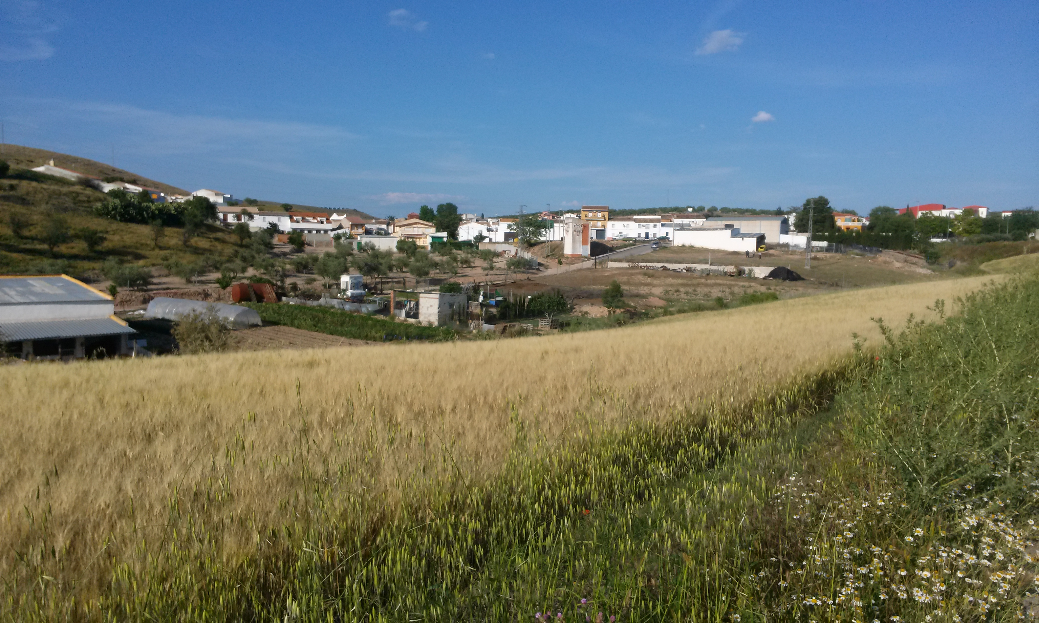 Vista de Torrequebradilla.